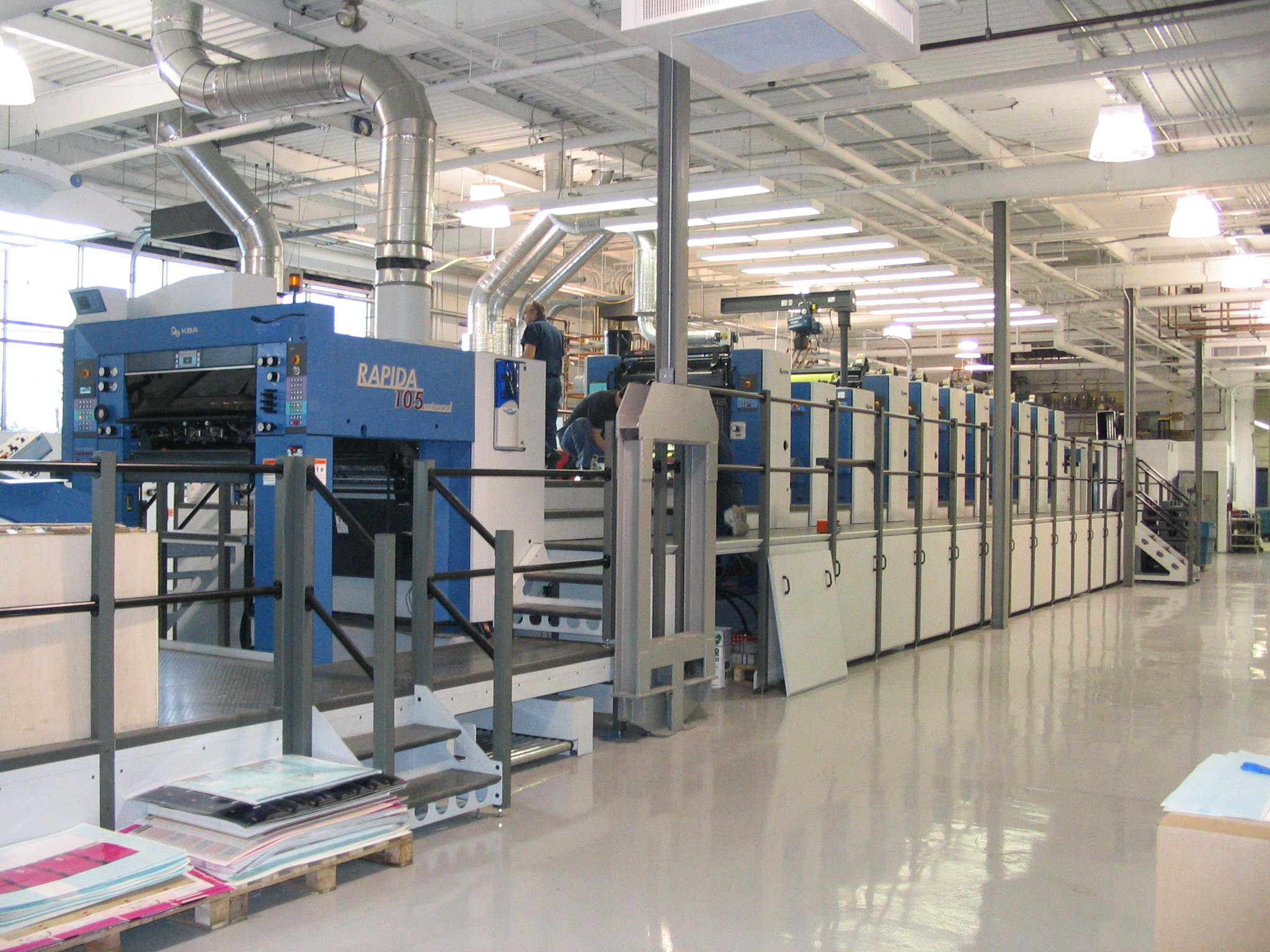 Druckmaschine